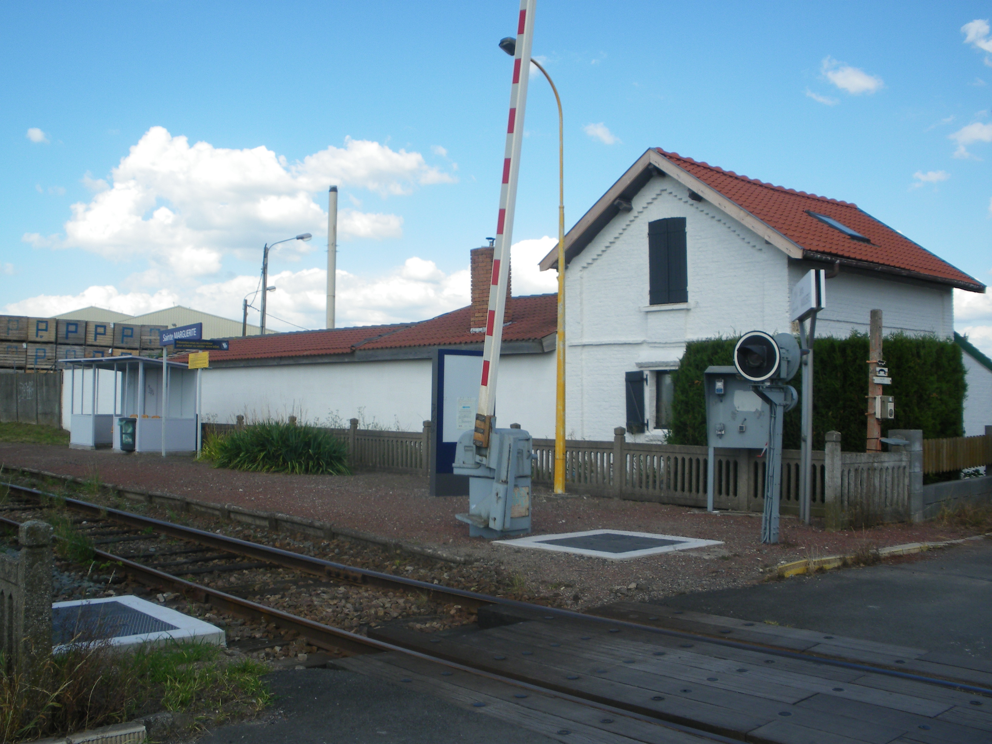 Vue de la halte ferroviaire Sainte-Marguerite à Comines.